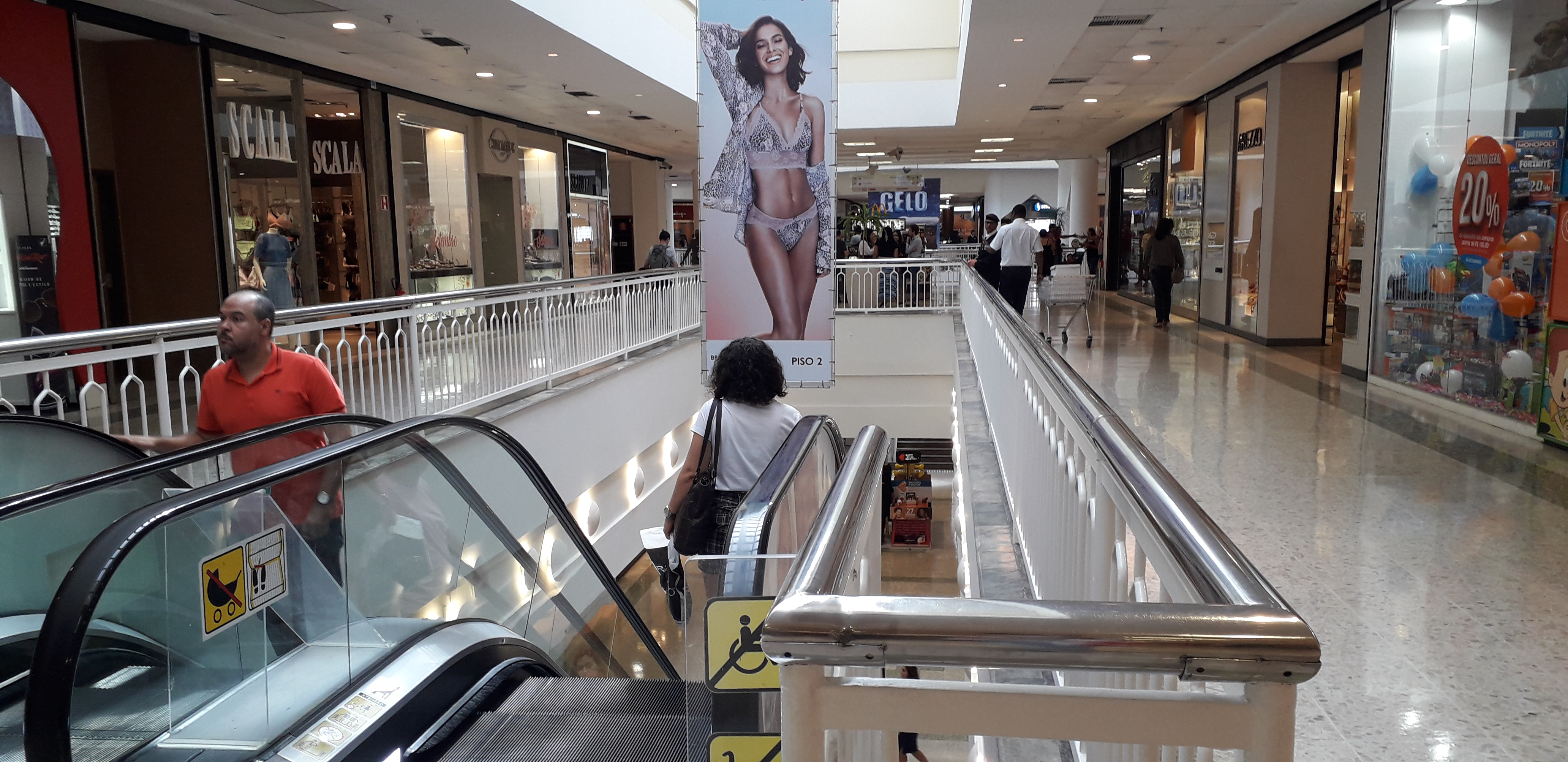 Imagens internas do Shopping RioMar Aracaju, Aracaju, Sergipe